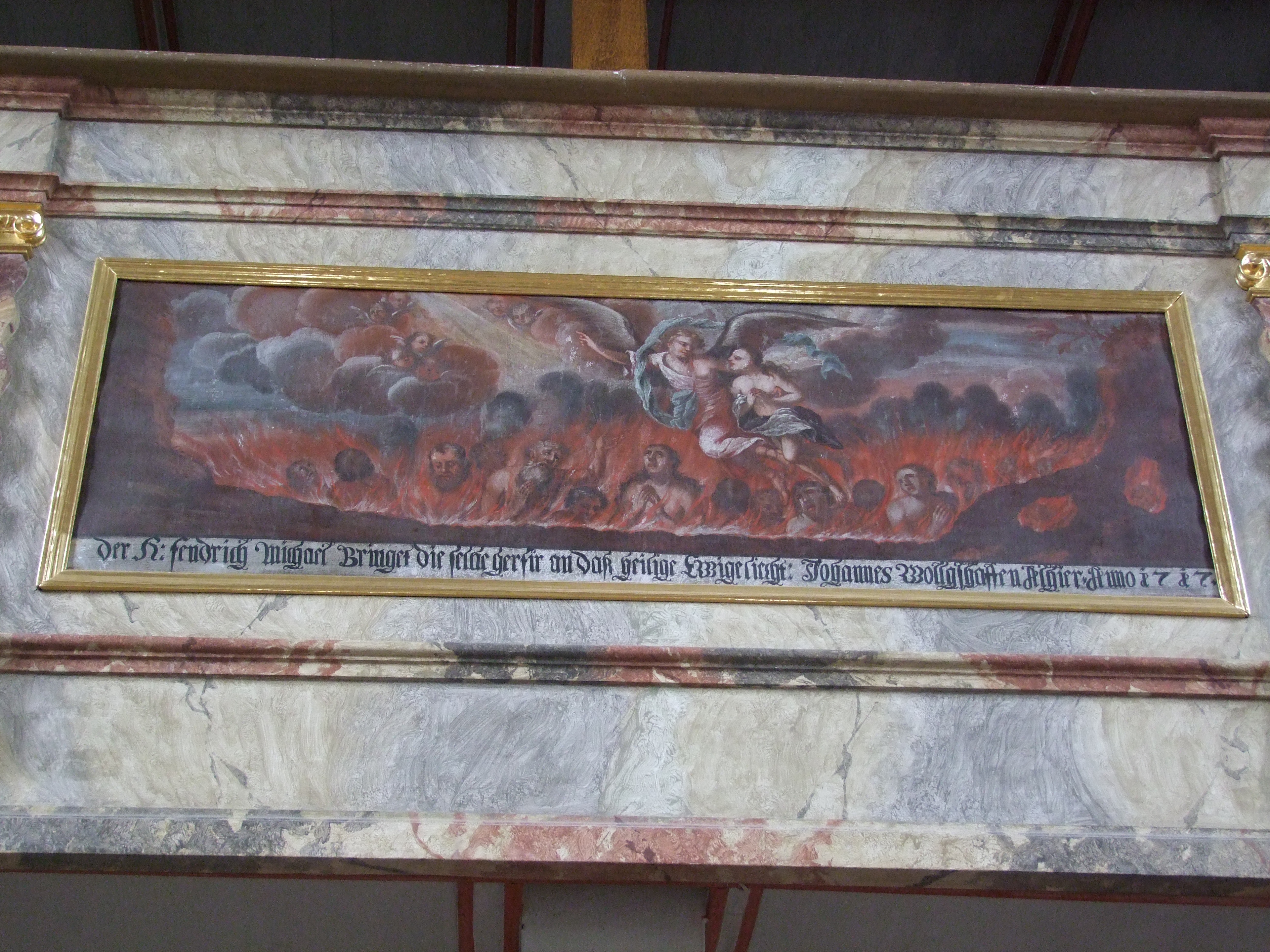 St. Michael in Stockach in Schwaben